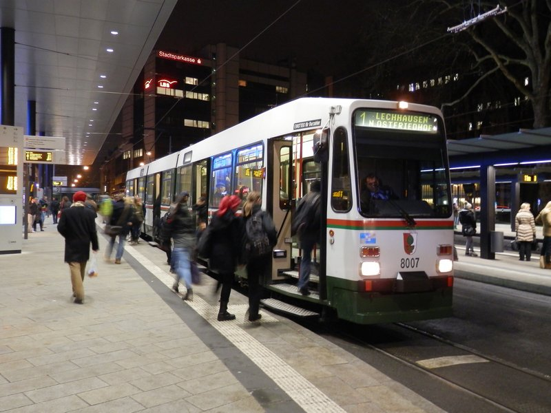 Augsburger M8C-Triebwagen 8007 an der Umsteigeanlage Königsplatz